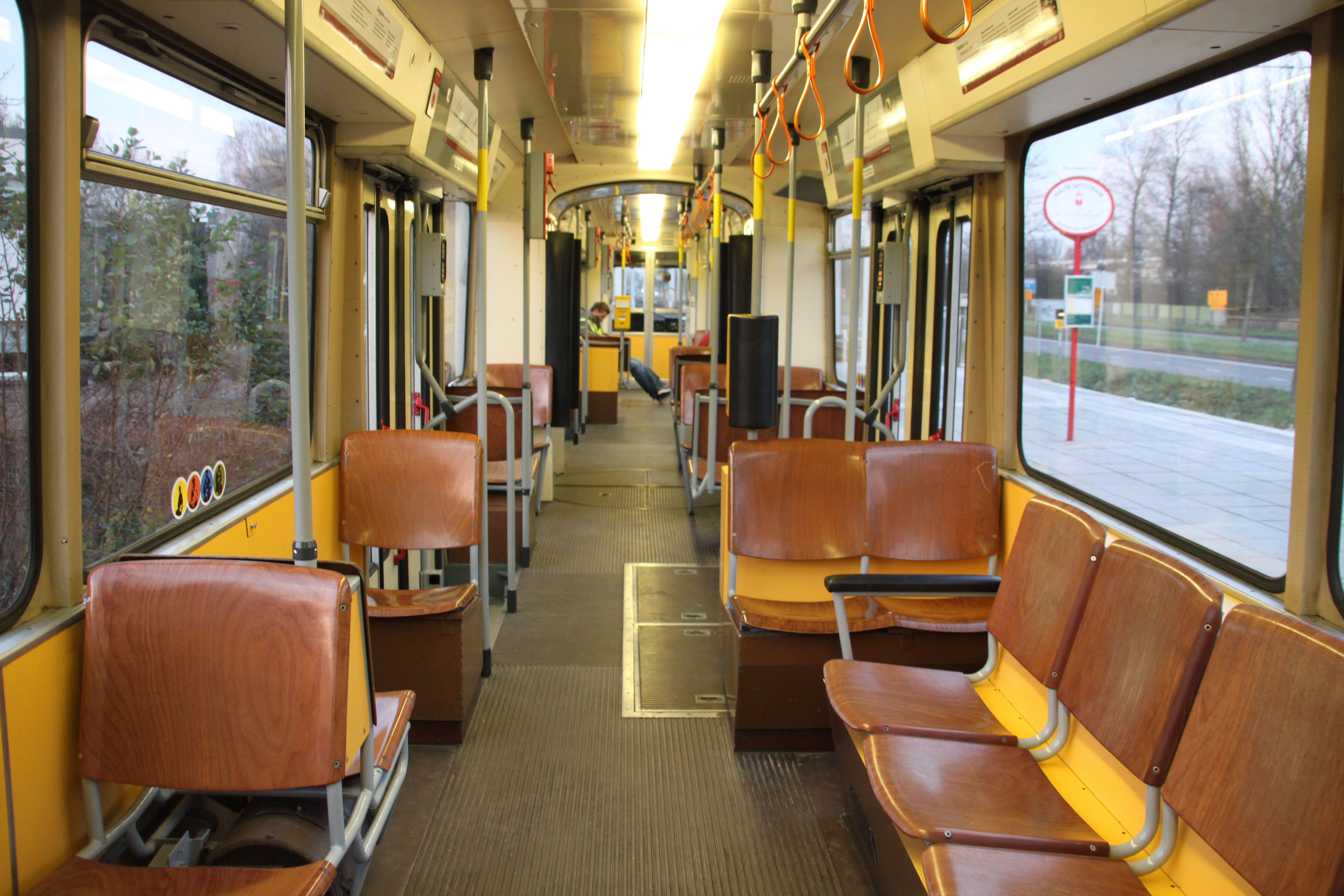 Interieur voormalig Wiener Linien tramstel in Utrecht